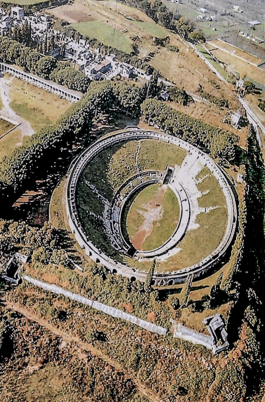 Anfiteatro y palestra de Pompeya